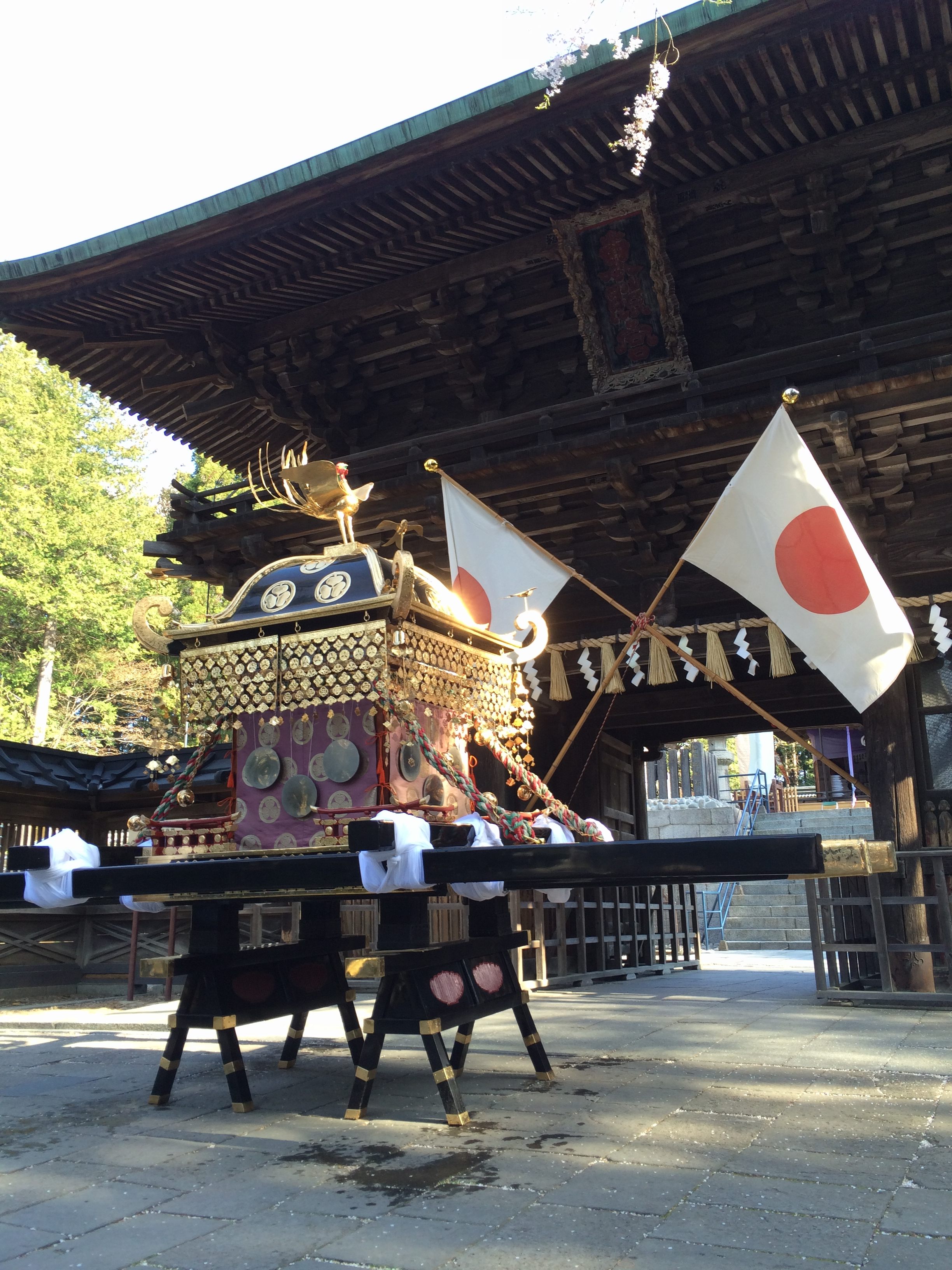 1654年の東照宮創建の際に江戸から仙台まで9日間で渡御し、1655年より現代まで東照宮の神輿渡御で仙台市内を巡幸する神輿。48人担ぎで約500貫である。